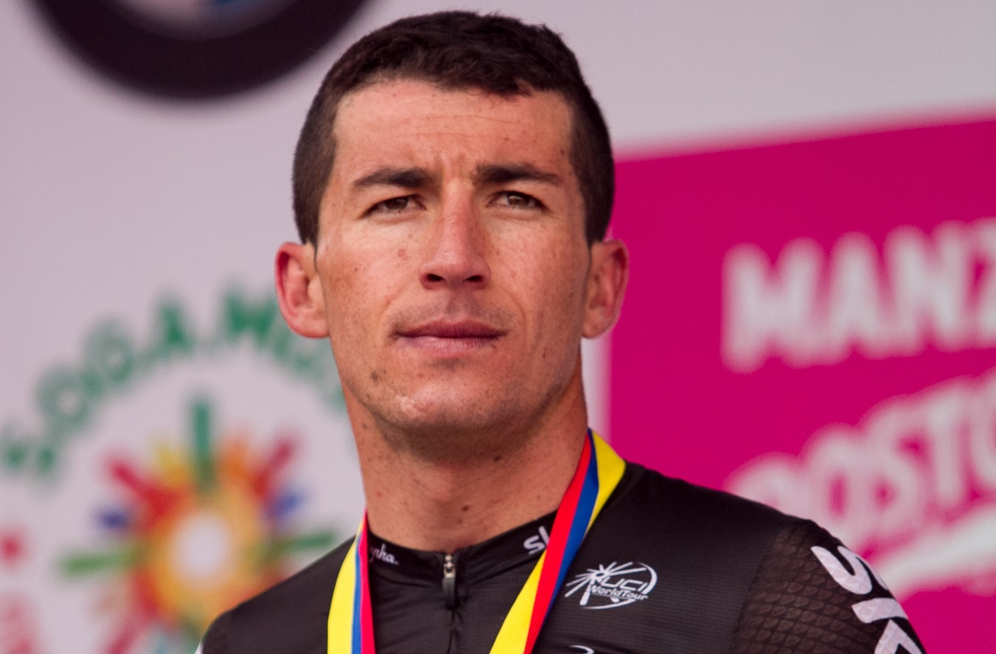 Sergio Luis Henao - Campeonato Nacional de Ruta Élite 2016